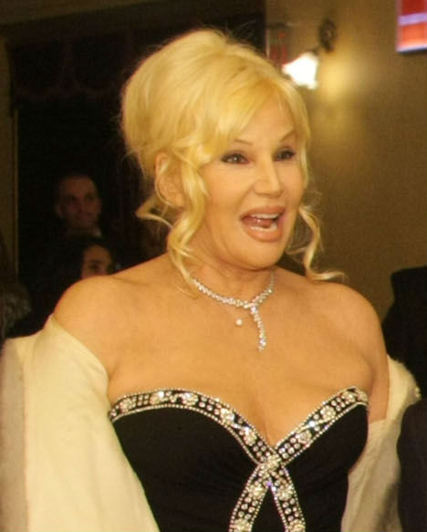 Gala de reapertura del Teatro Colón. Susana Giménez en la galería del Teatro.